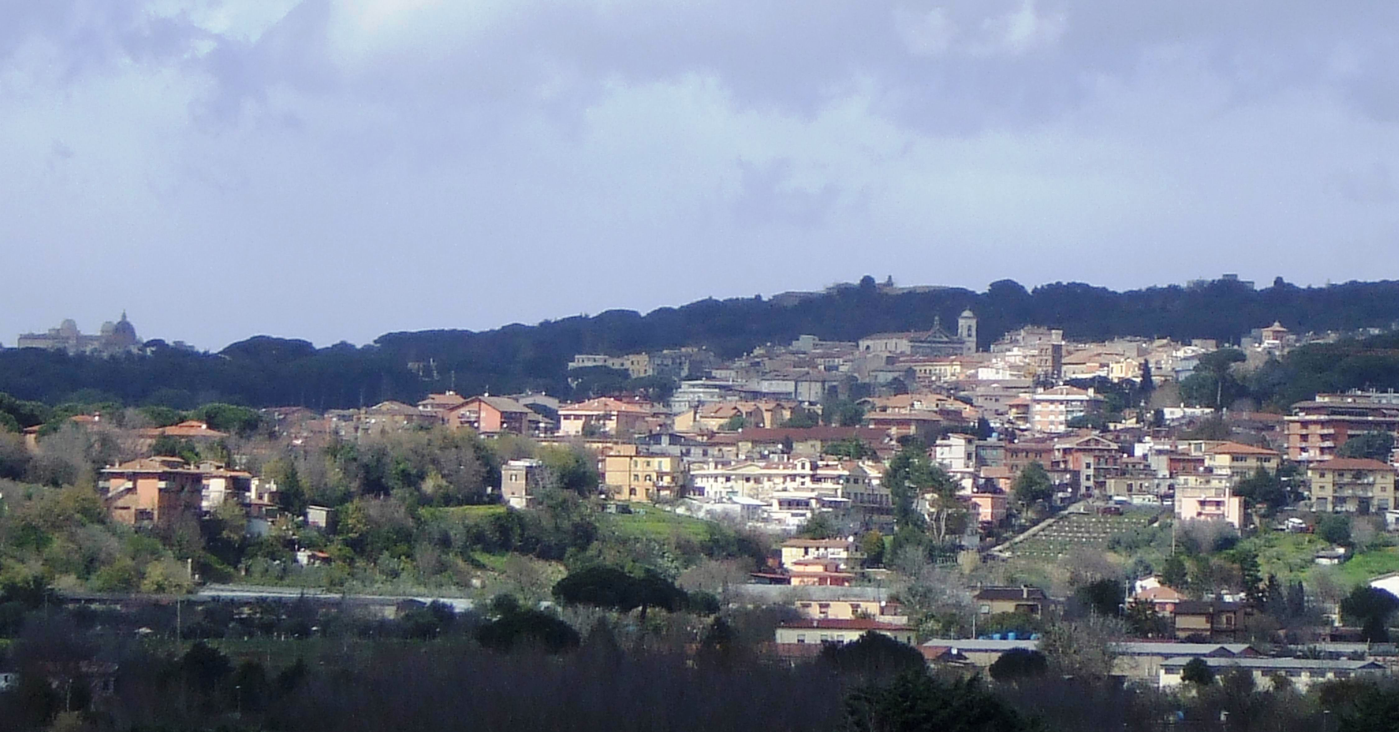 Albano laziale centro e Castel Gandolfo